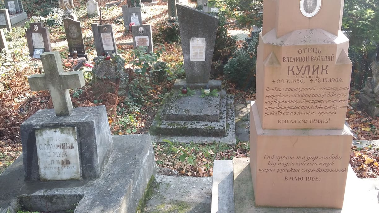 Могила знаходиться на 21 полі Личаківського кладовища у м. Львові. Це спільна могила о.Висаріона Василія Кулика та о.Анастасія Калиша.